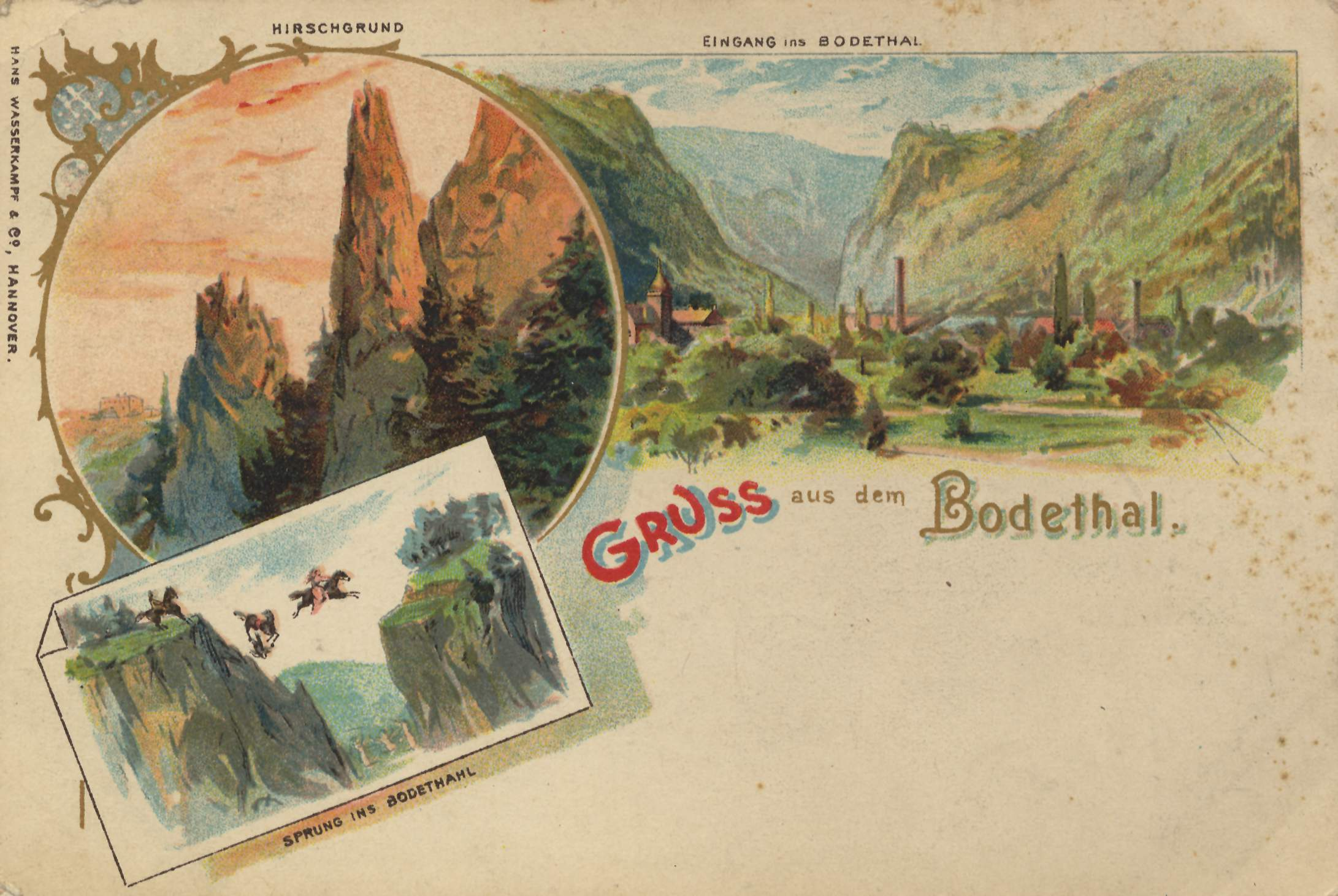 Hirschgrund; Eingang ins Bodetal; Sprung ins Bodetal